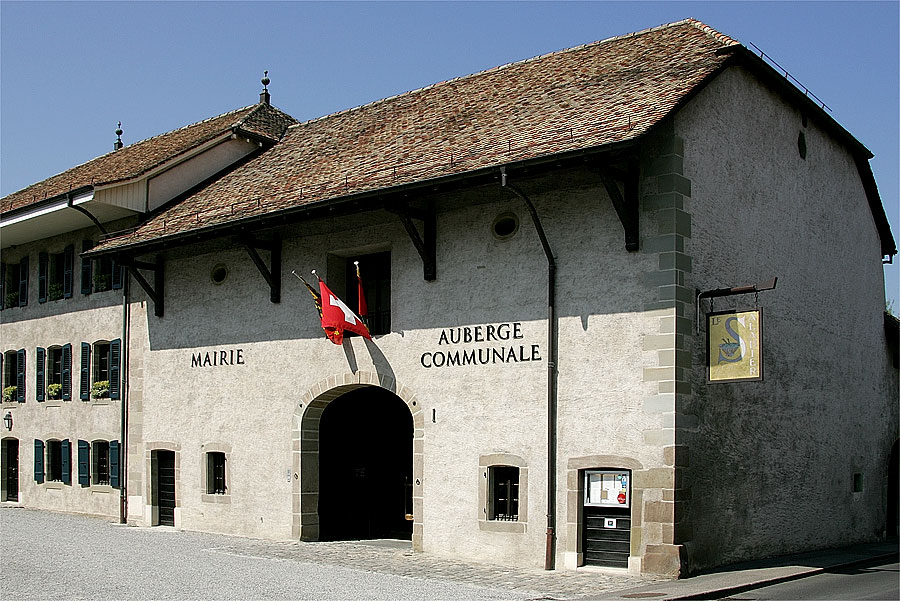 Mairie de Collonge